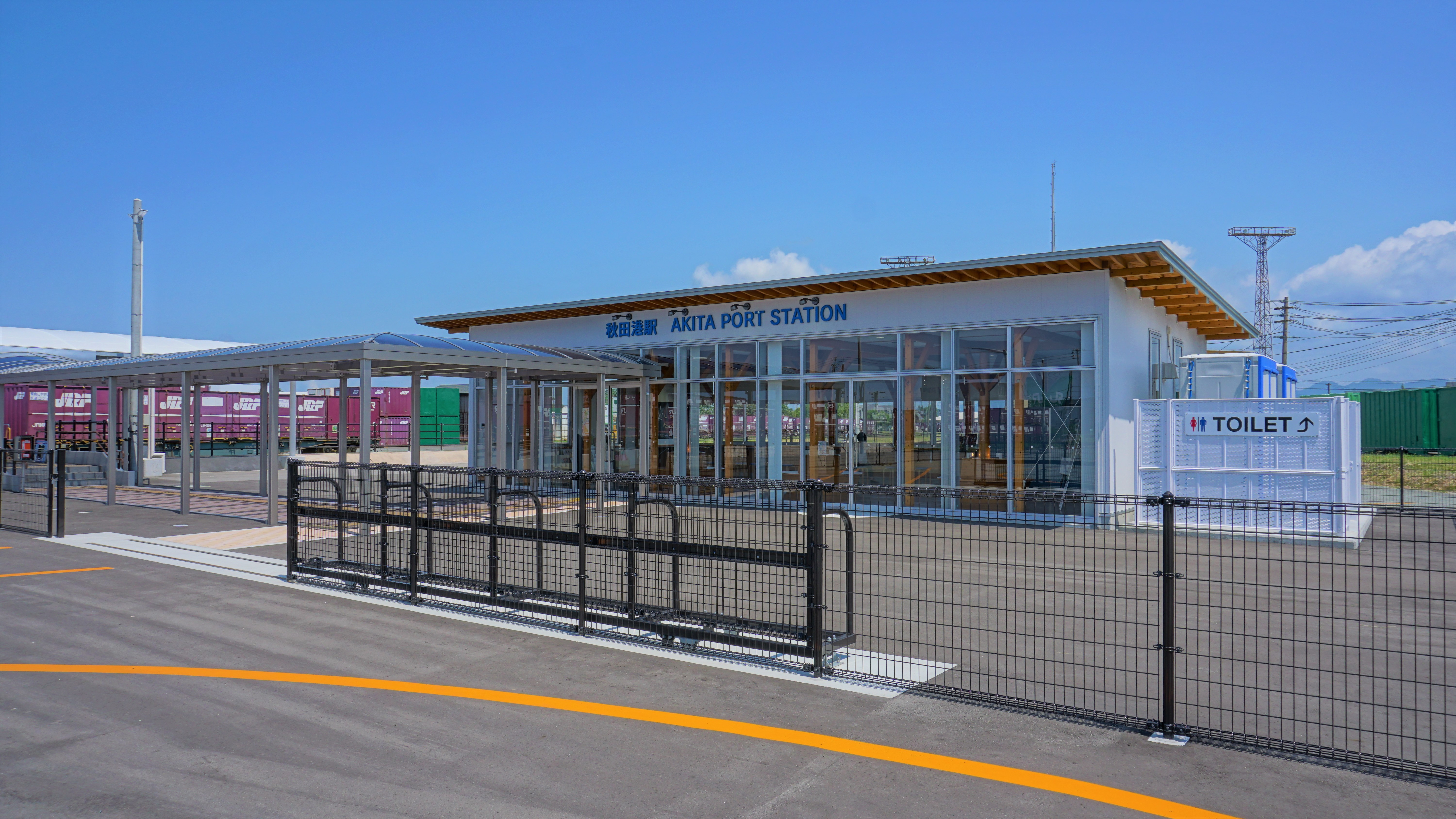 秋田港駅旅客待合室。クルーズ船寄港時に臨時列車が運行されるときだけ開放される駅舎である。